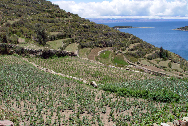 Isla del Sol